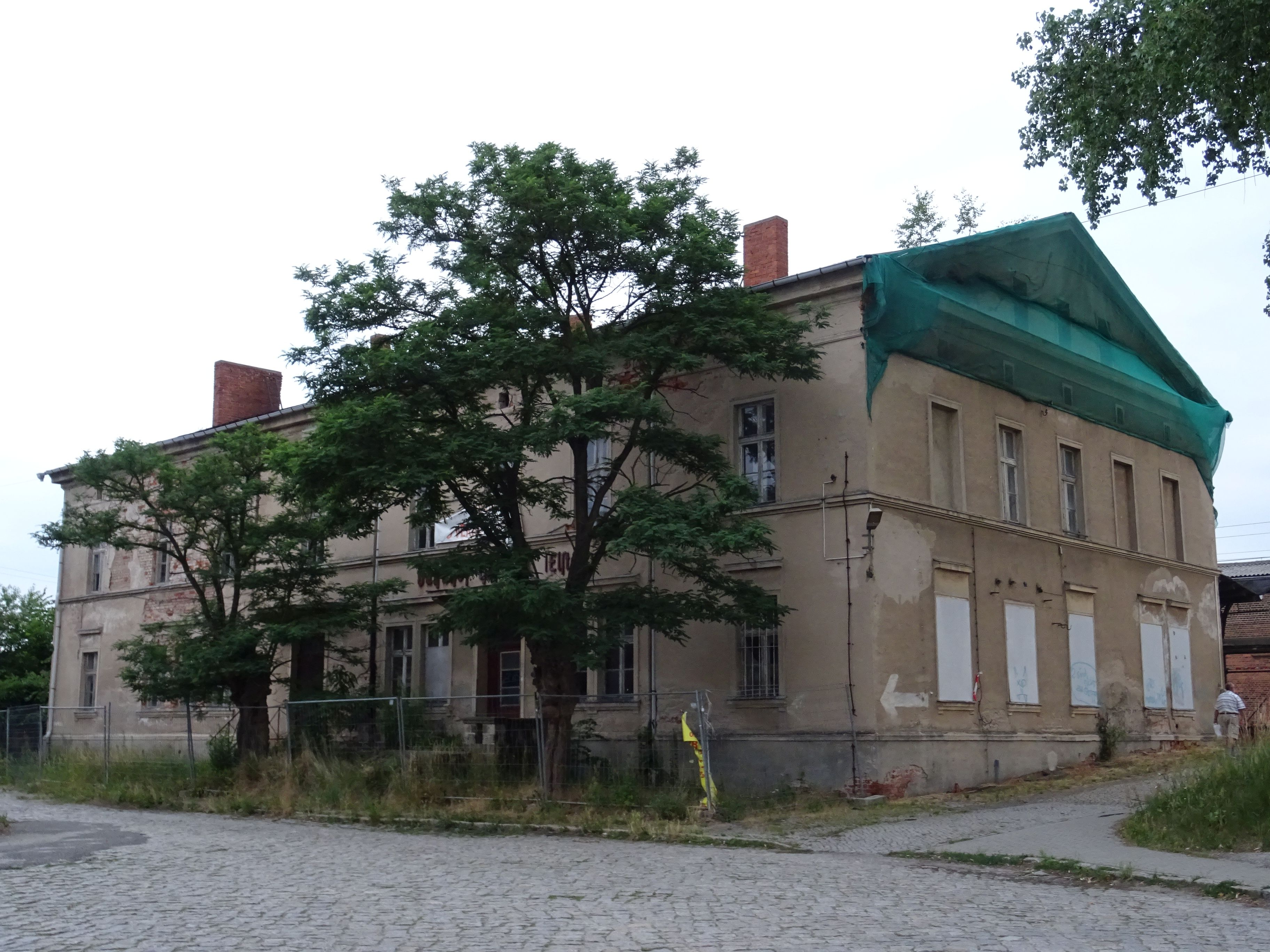 Bahnhof Holzdorf (Elster),Empfangsgebäude, Straßenseite